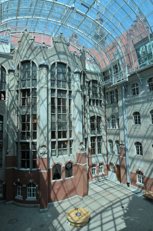 Gmach główny. Dziedziniec im. Jana Heweliusza.